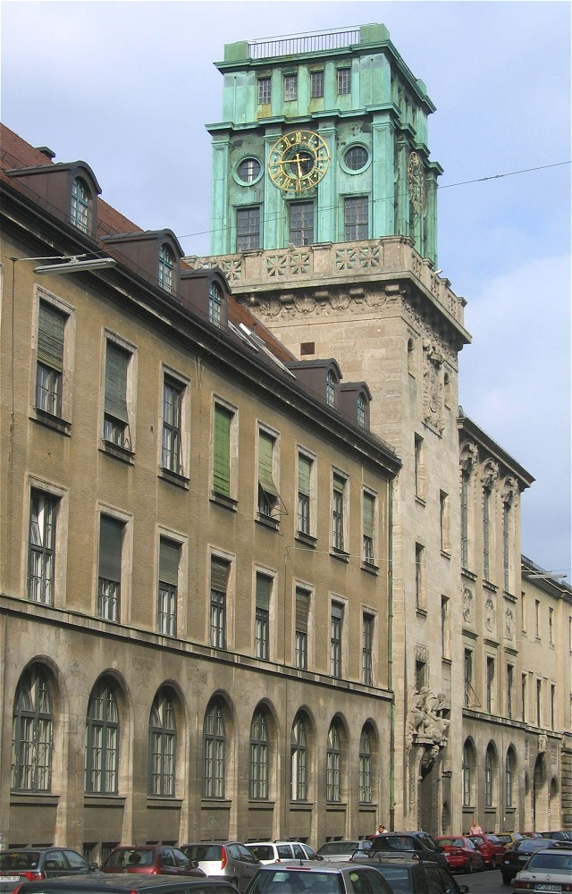 Technische Universitaet Muenchen